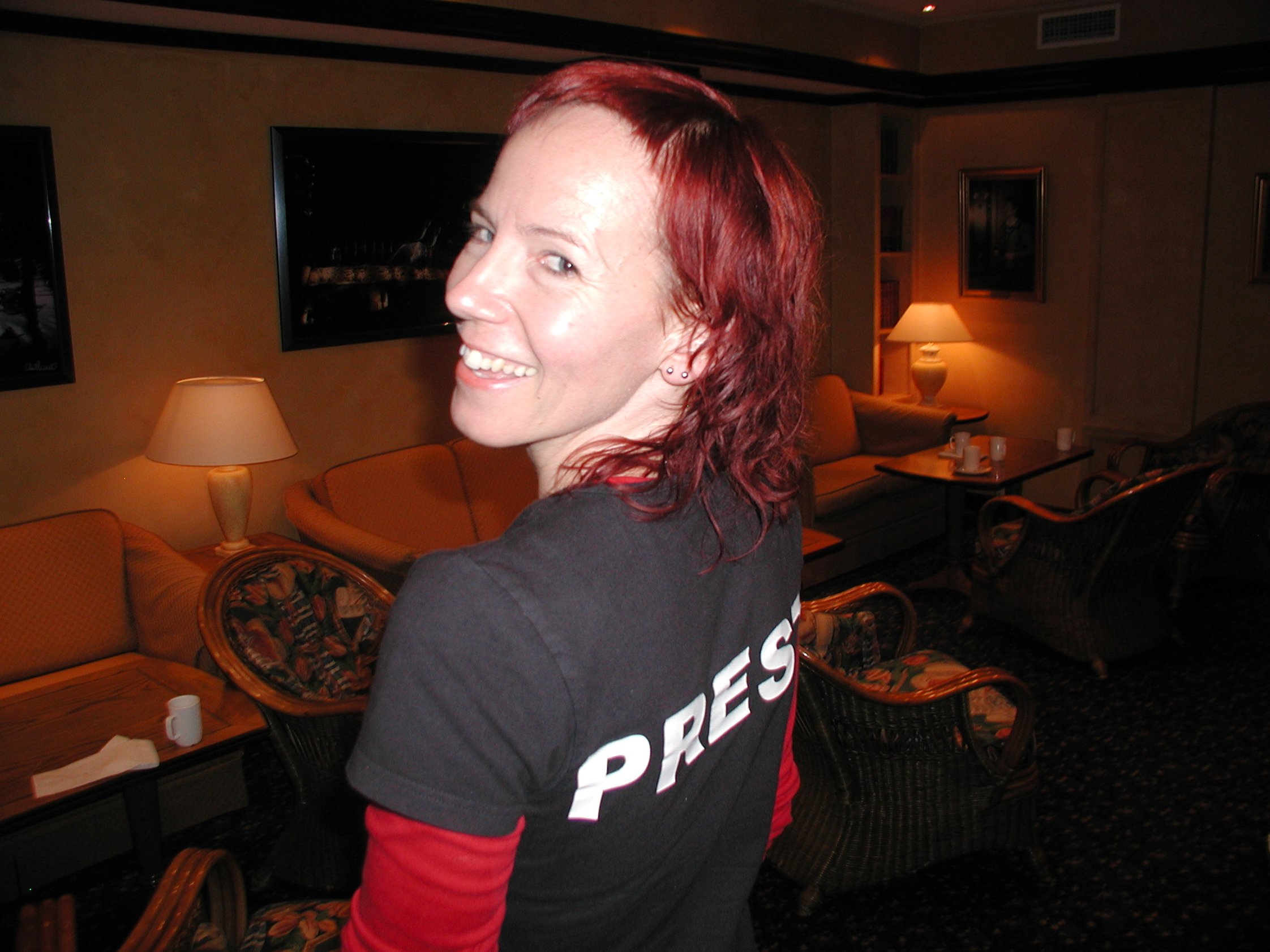 Sunniva Gylver, norsk prest (Dnk). Bilde fra Kirkemøtet 2005